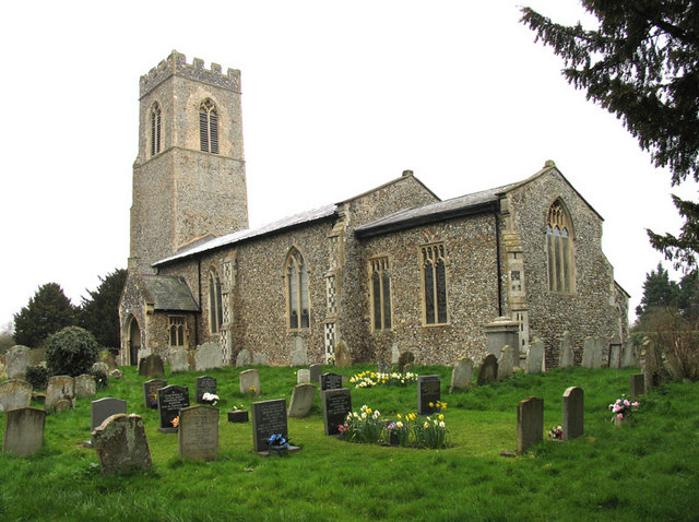 St Mary Magdalene, Mulbarton, Norfolk